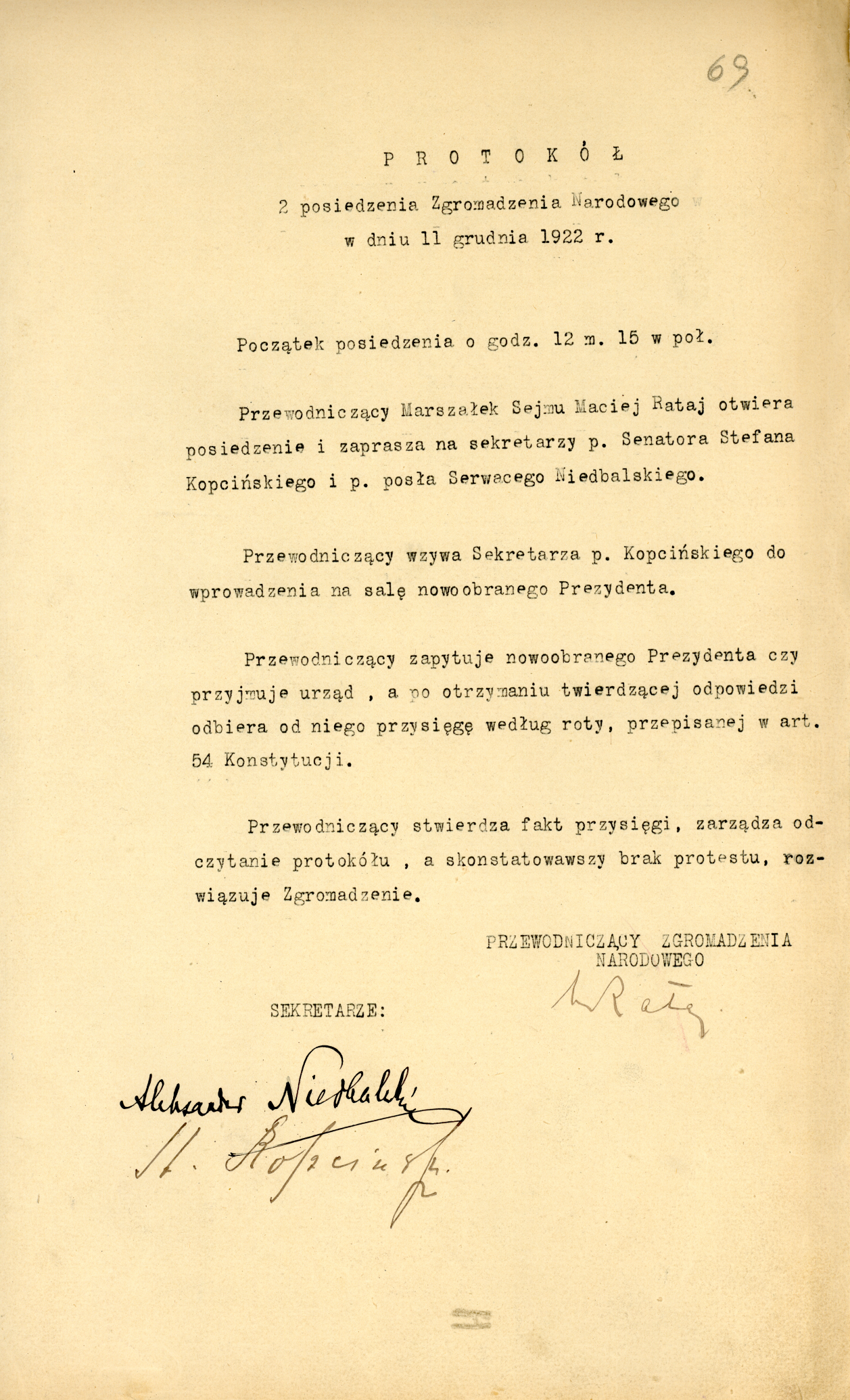 Protokół z posiedzenia Zgromadzenia Narodowego dotyczącego przyjęcia urzędu prezydenta